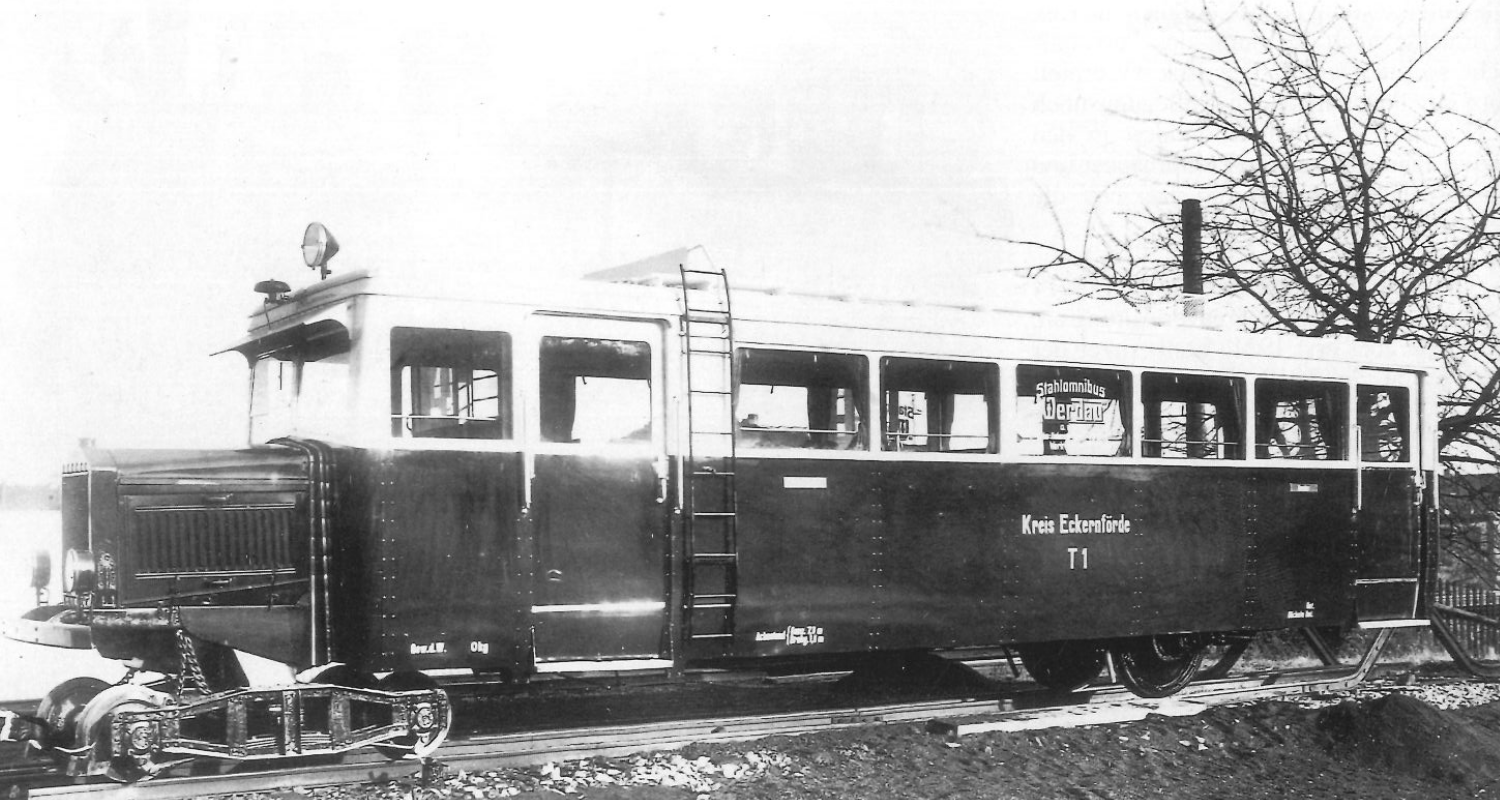 Eckenförder Kreisbahnen T1